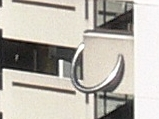 Ring am Rathaus Heidenheim an der Brenz, Blick von Schloss Hellenstein